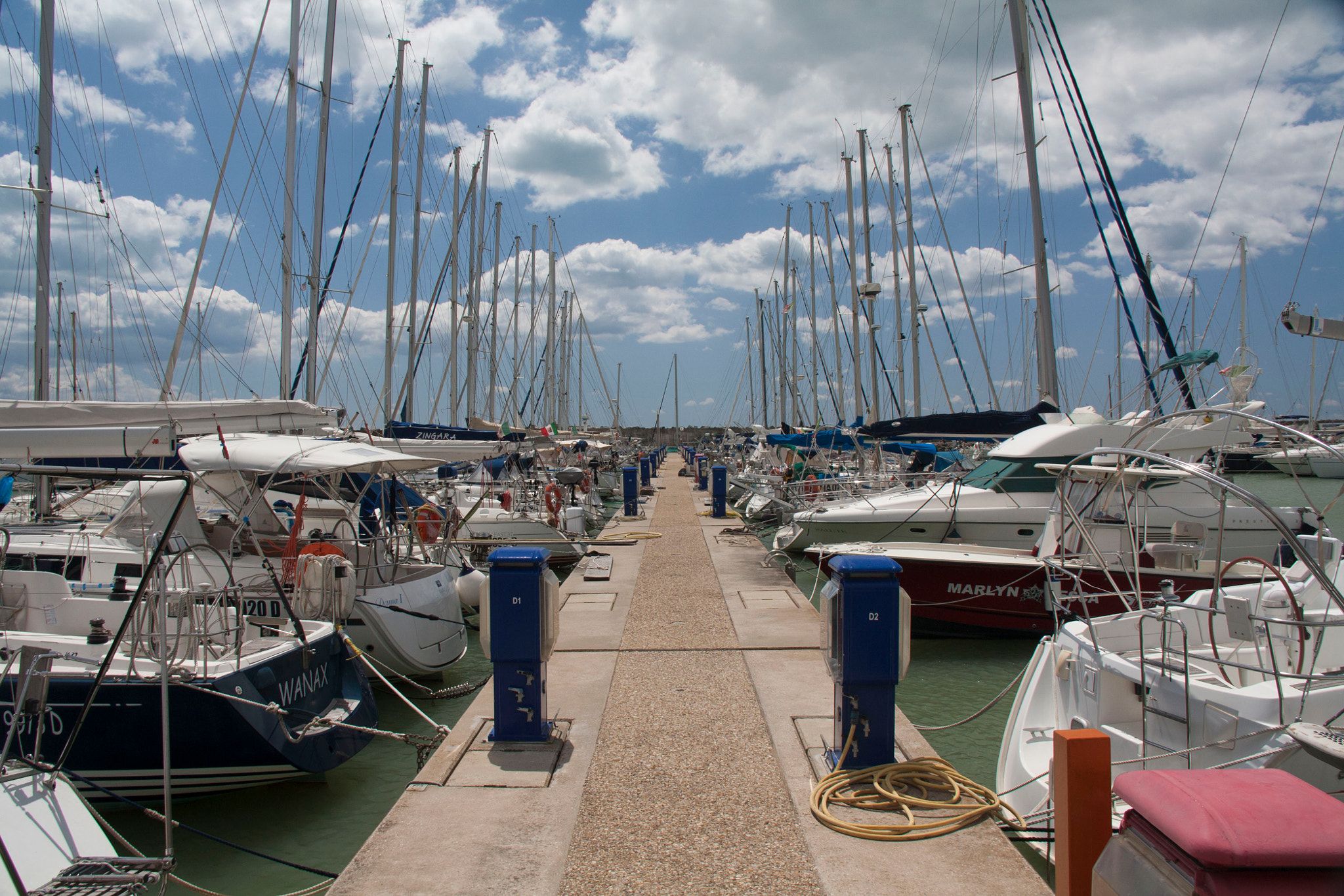 500px provided description: Porto turistico di Roma [#Sea ,#Roma ,#Ostia]